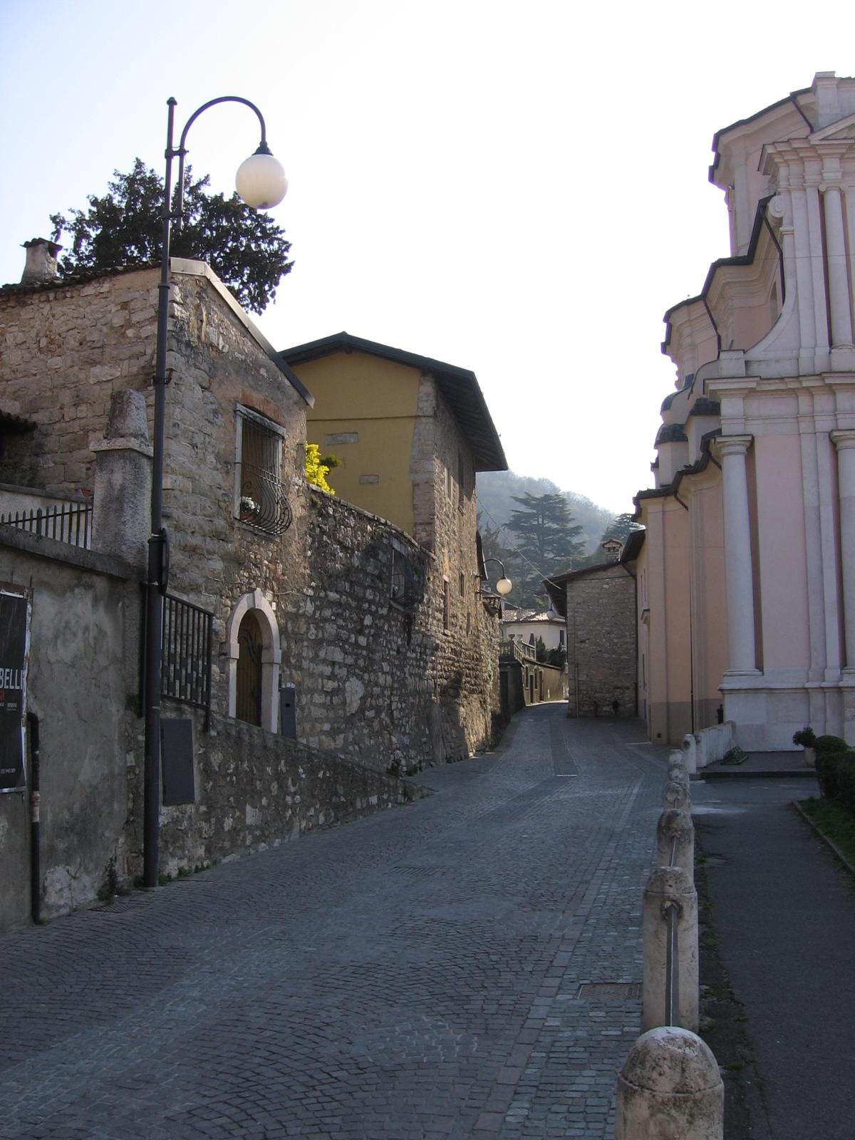 Zandobbio, Bergamo, Italia